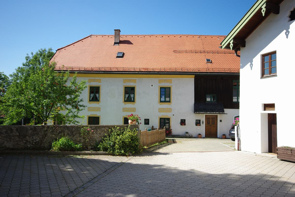 Kardinal-von-Faulhaber-Platz 9, 83313 SiegsdorfThis is a photograph of an architectural monument.